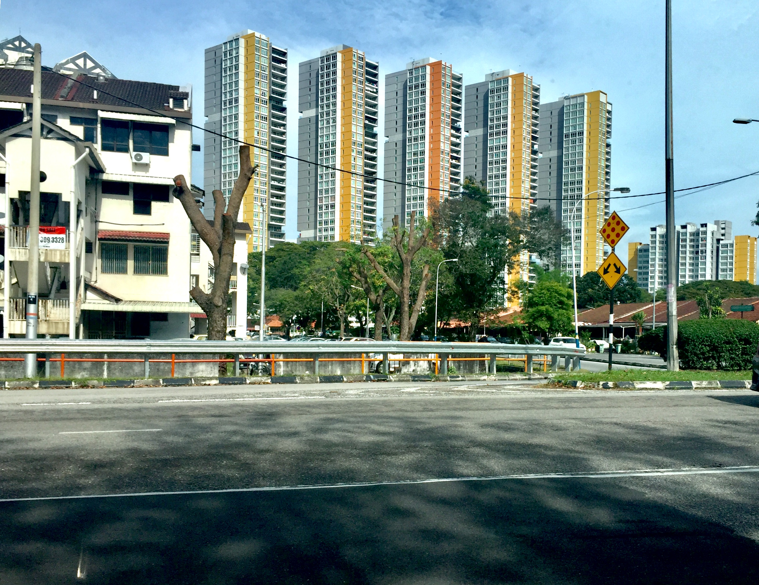 通往峇都兰樟的道路